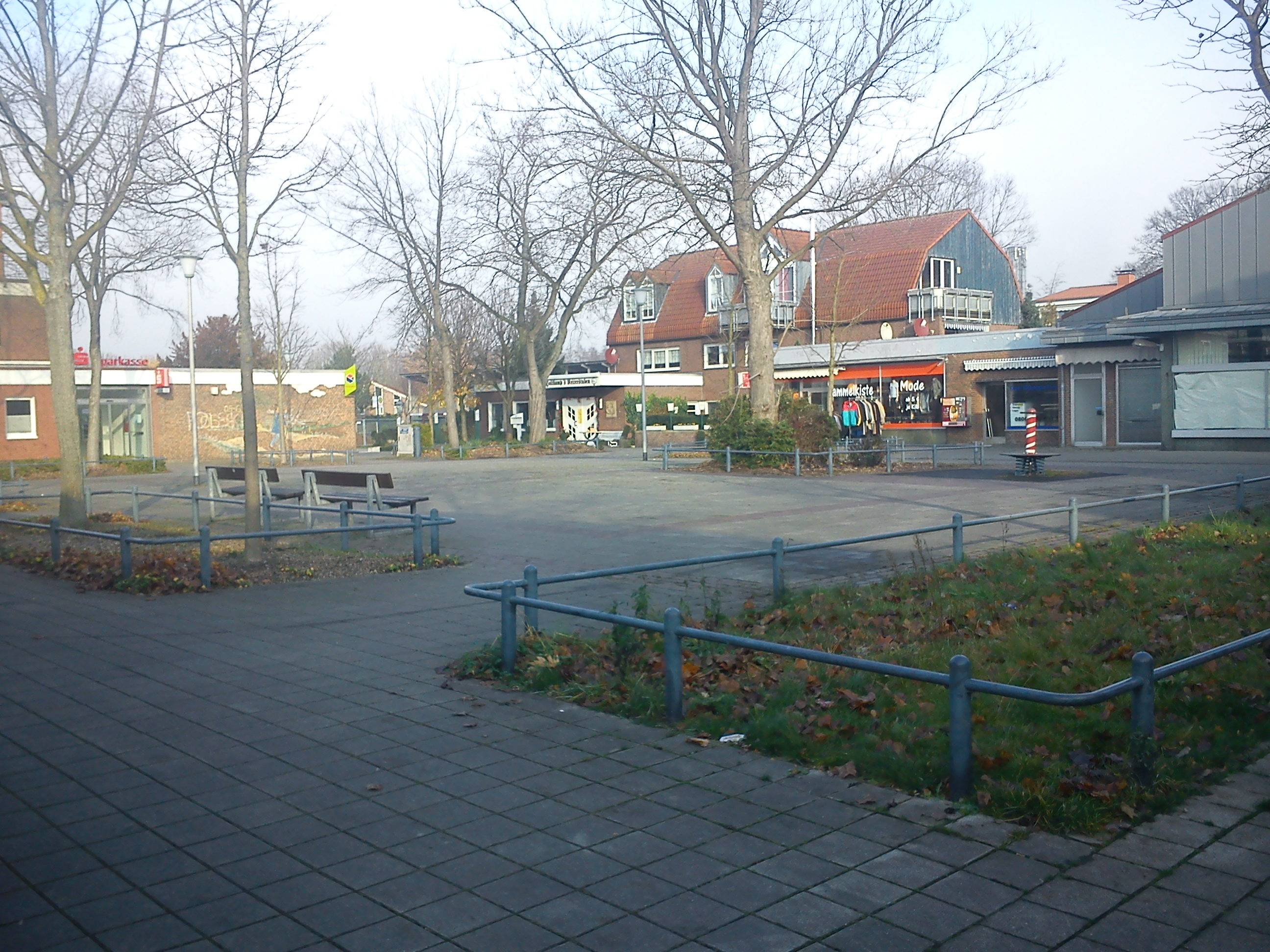 Blumenbeet auf dem Junker Jorkplatz